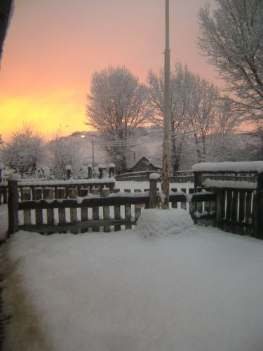 Villa La Tapera